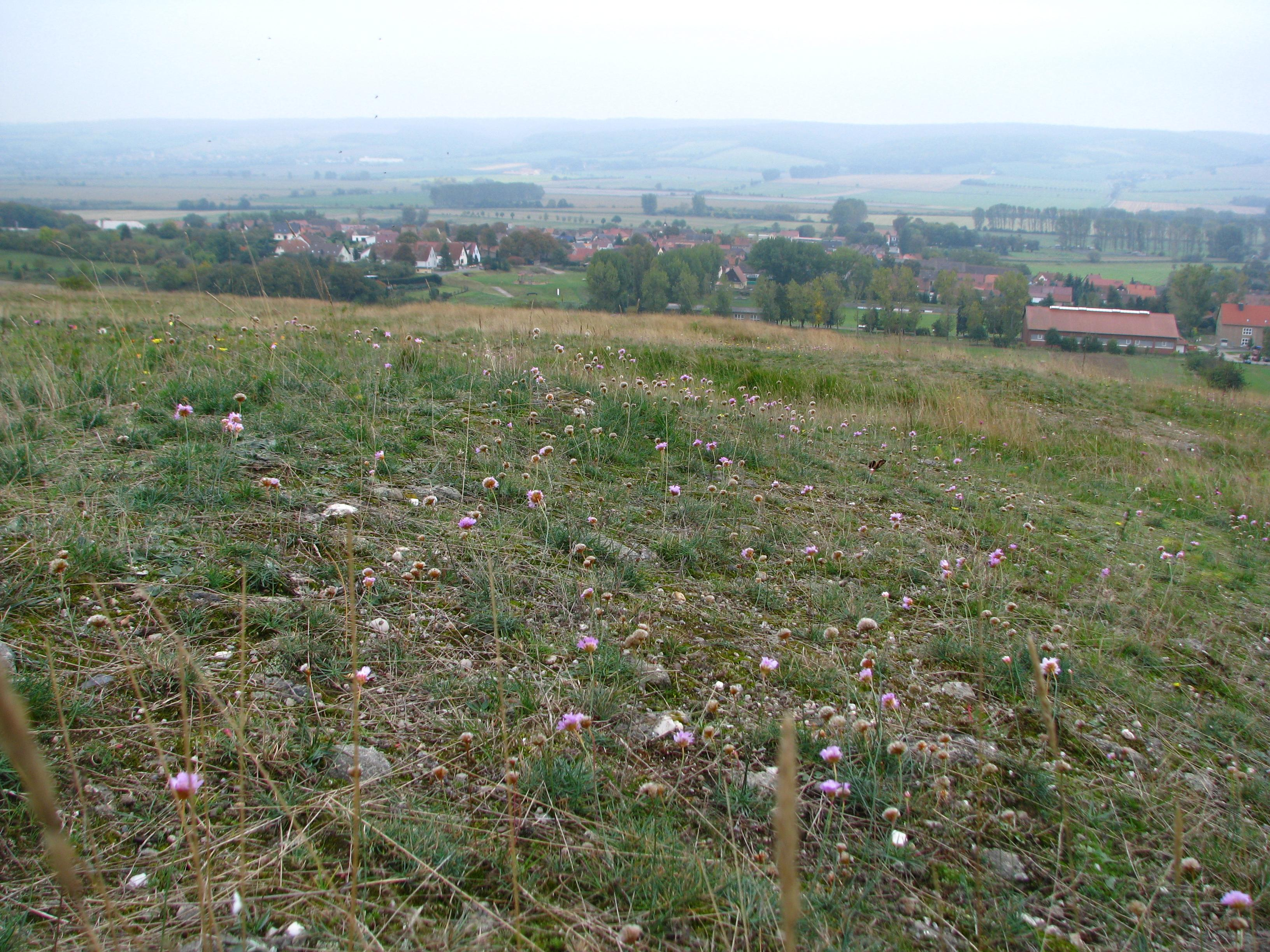 Blick von den Bottendorfer Hügeln über Bottendorf zur Hohen Schrecke. Im Vordergrund Schwermetallrasen mit Bottendorfer Grasnelke.